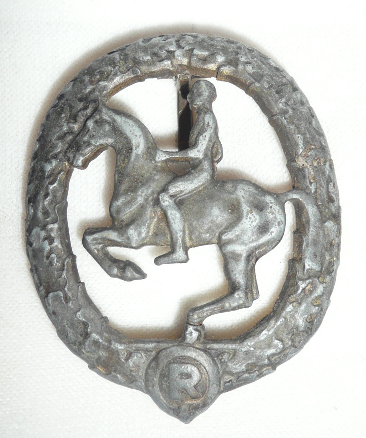 Deutsches Reitabzeichen in Bronze